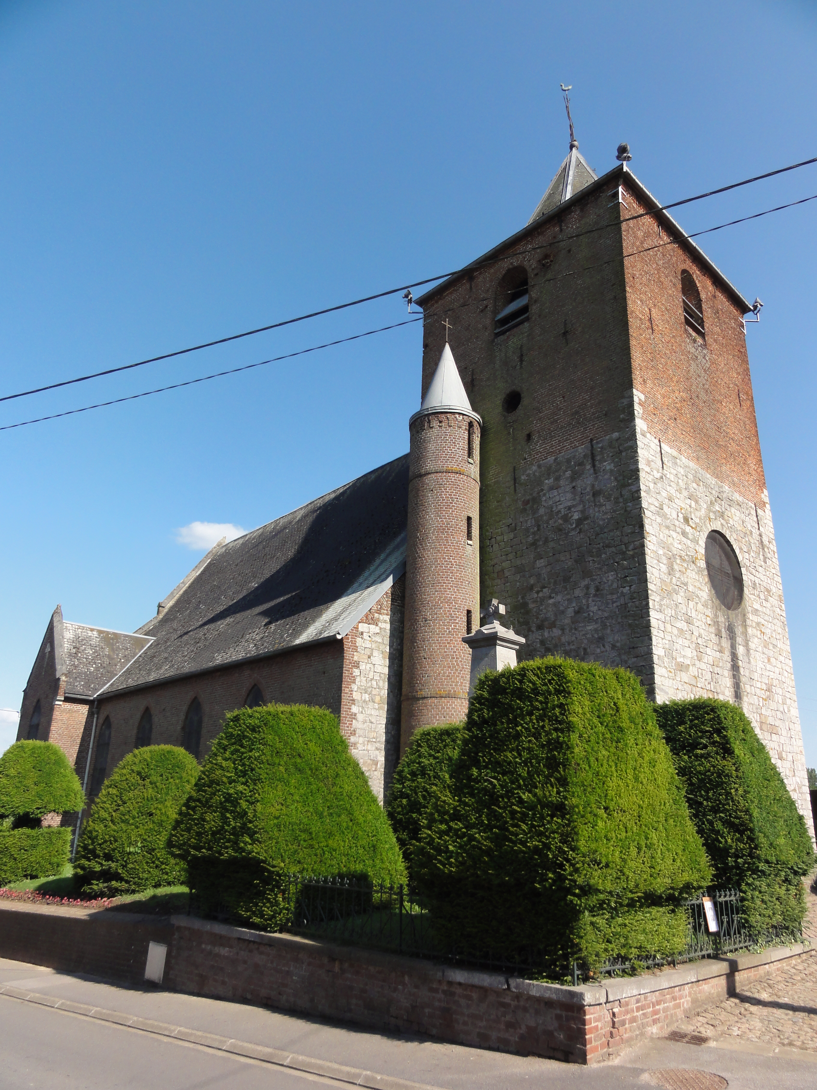 Beaudignies (Nord, Fr) église vue semi-latérale